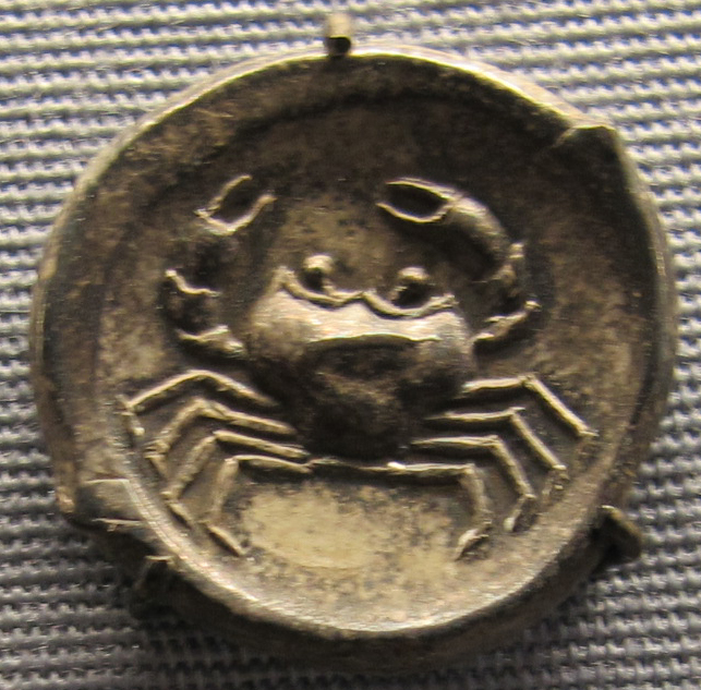 Himera, didracma, 482-472 ac. ca